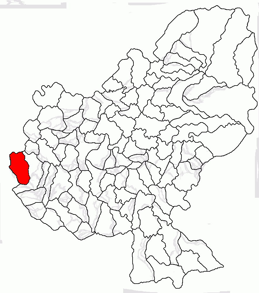 Categorie:Hărţi ale judeţului Mureş